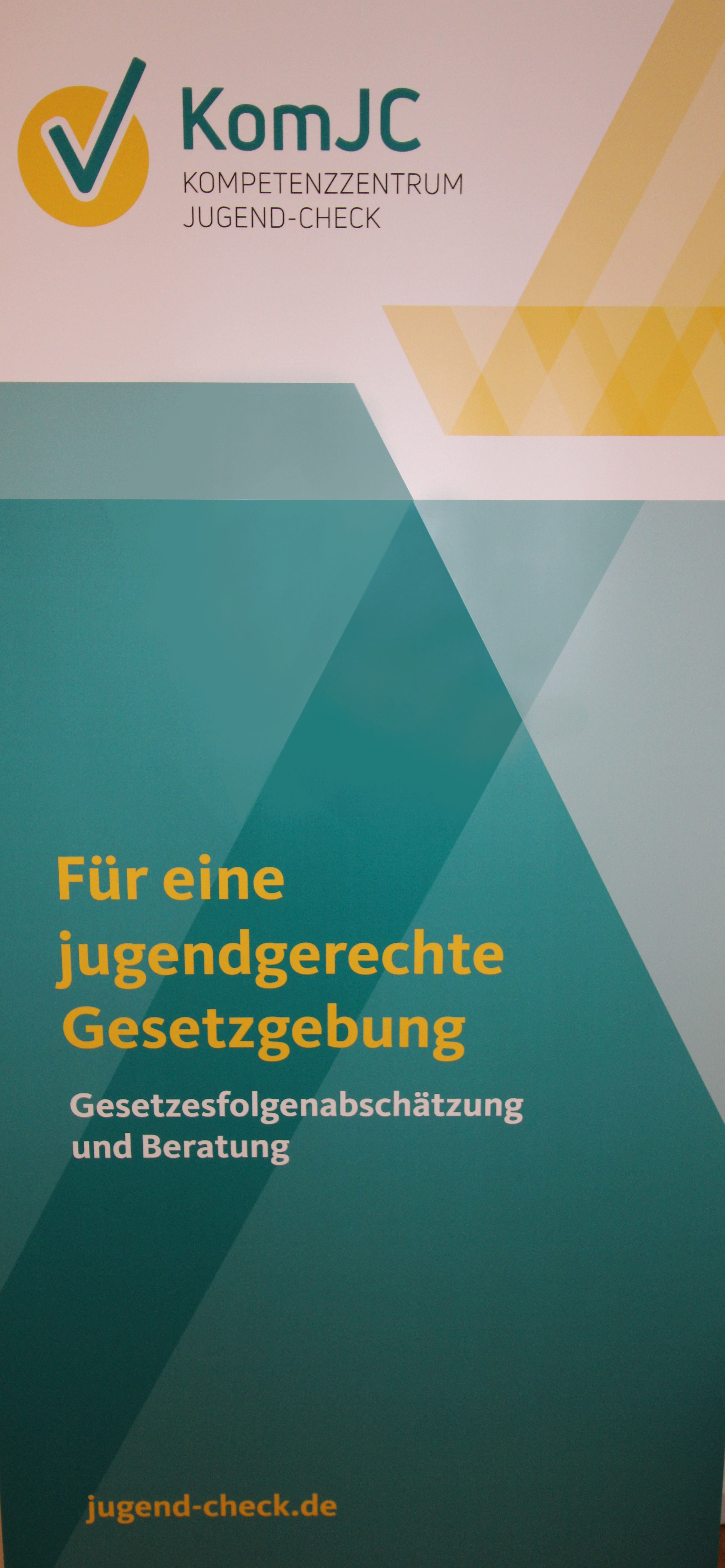 Rollup des Kompetenzzentrums Jugend-Check